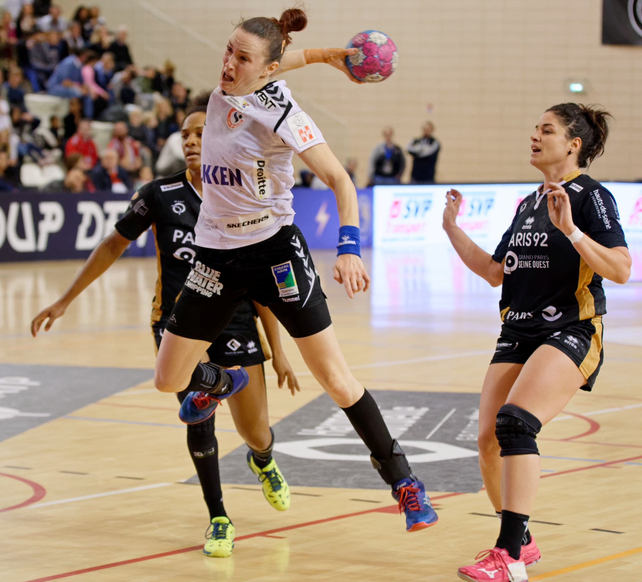 Lors de la rencontre du 3e tour de la Coupe EHF entre Paris 92 et les danoises de Team Esbjerg. A Issy les moulineaux, le 18 novembre 2018.